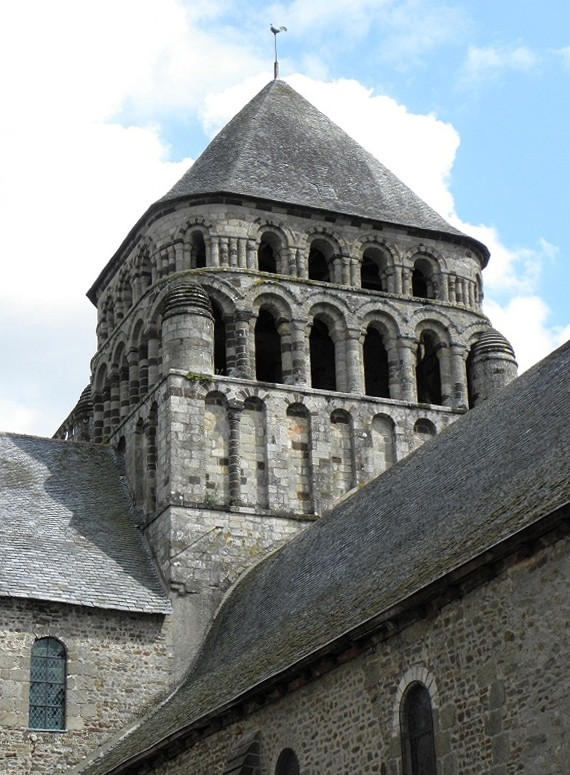 Tour romane à la croisée du transept de l'abbatiale Saint-Sauveur de Redon (35). .